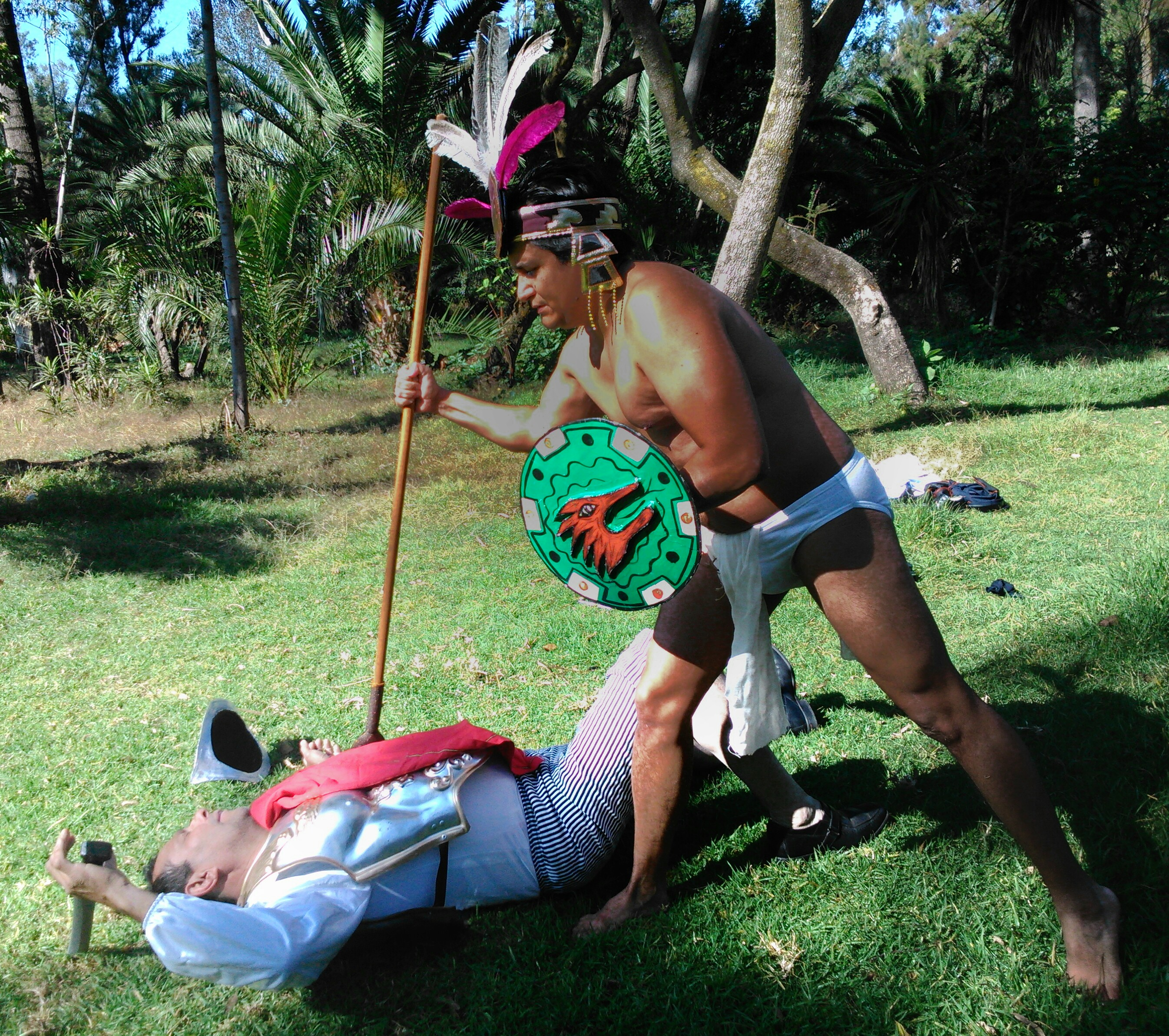 Indígena azteca en.batalla en un intento de atravesar con su lanza la armadura metálica que protege el cuerpo del conquistador español.